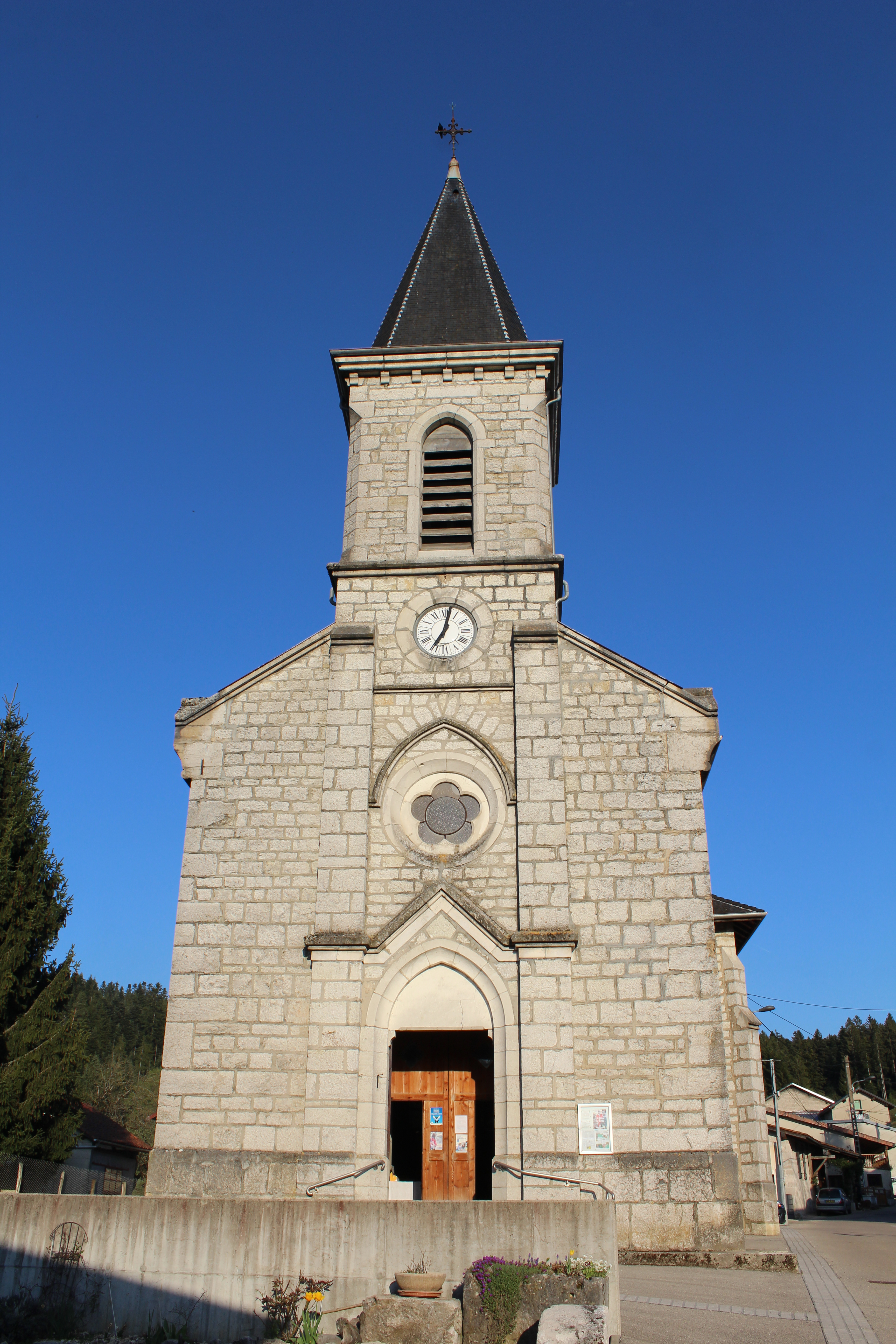 Église Saint-Pierre de Condamine, Ain.